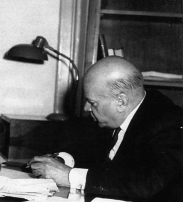 عباس ریاضی کرمانی